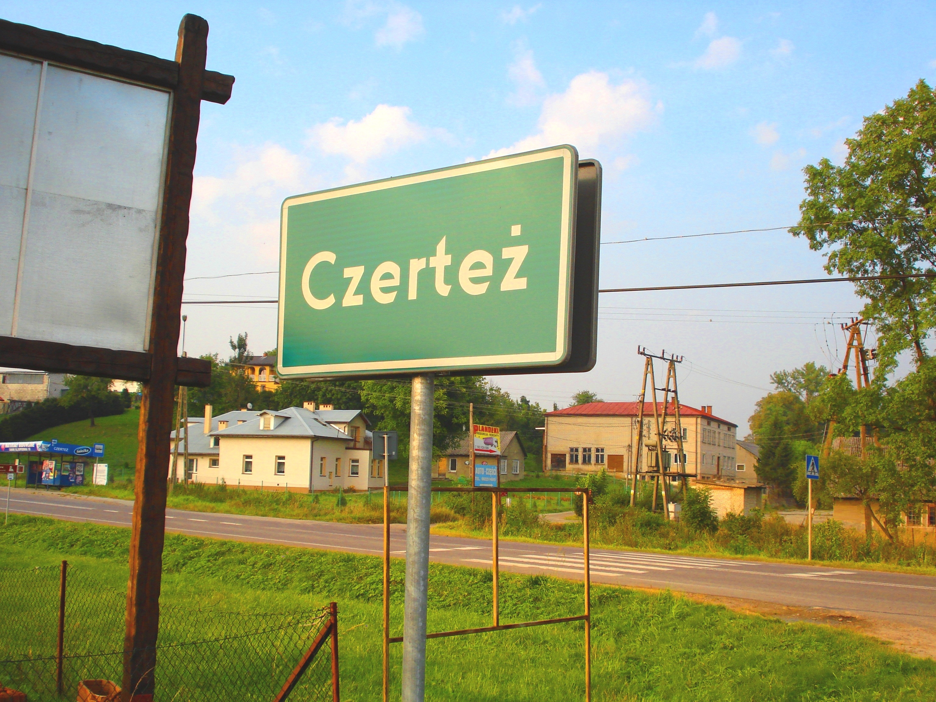 Czerteż znak drogowy